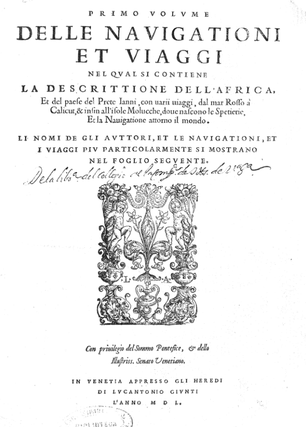 Ramusio, Navigationi et viaggi vol. 1 (1st ed., 1550) title page